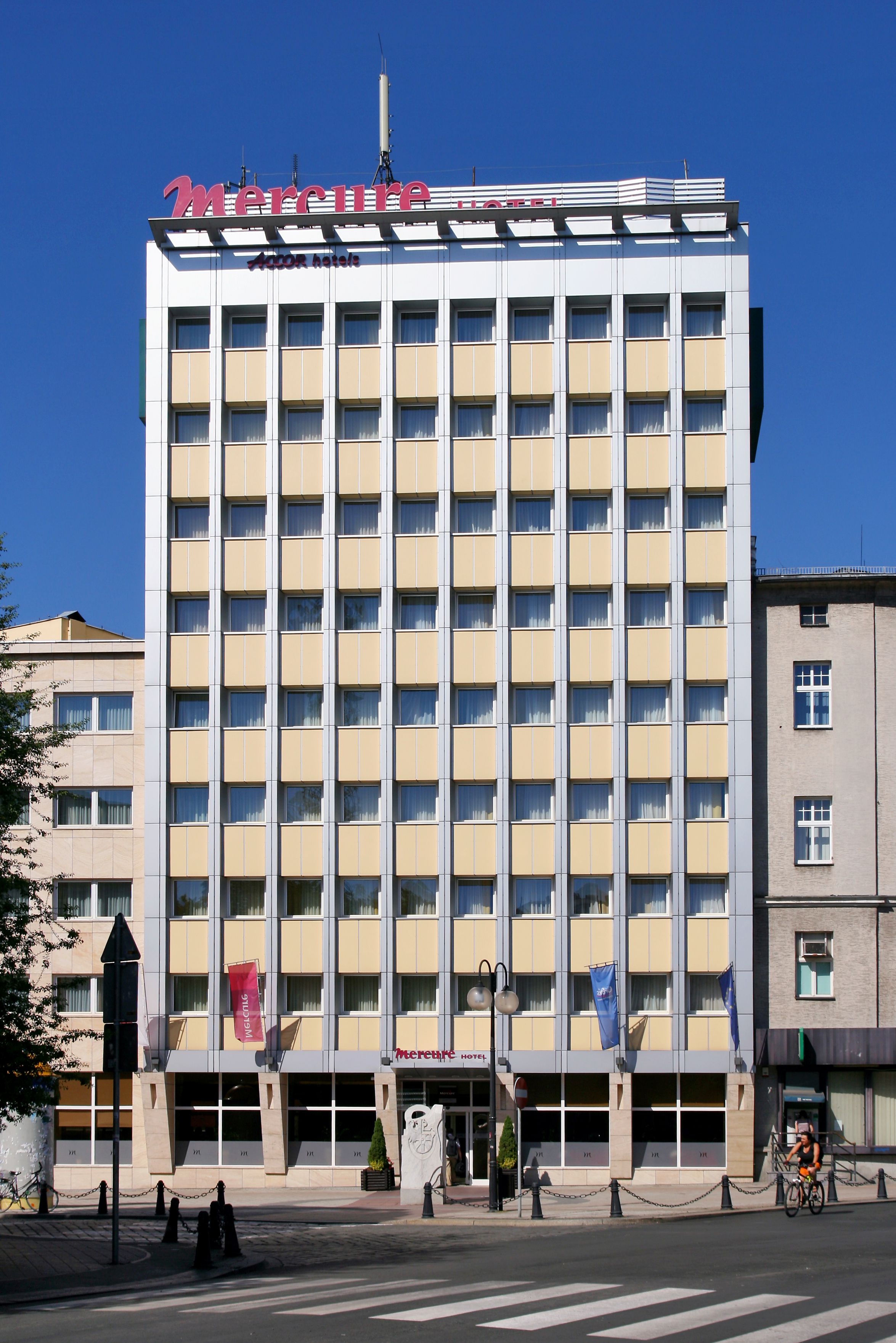 Hotel Mercure w Opolu.